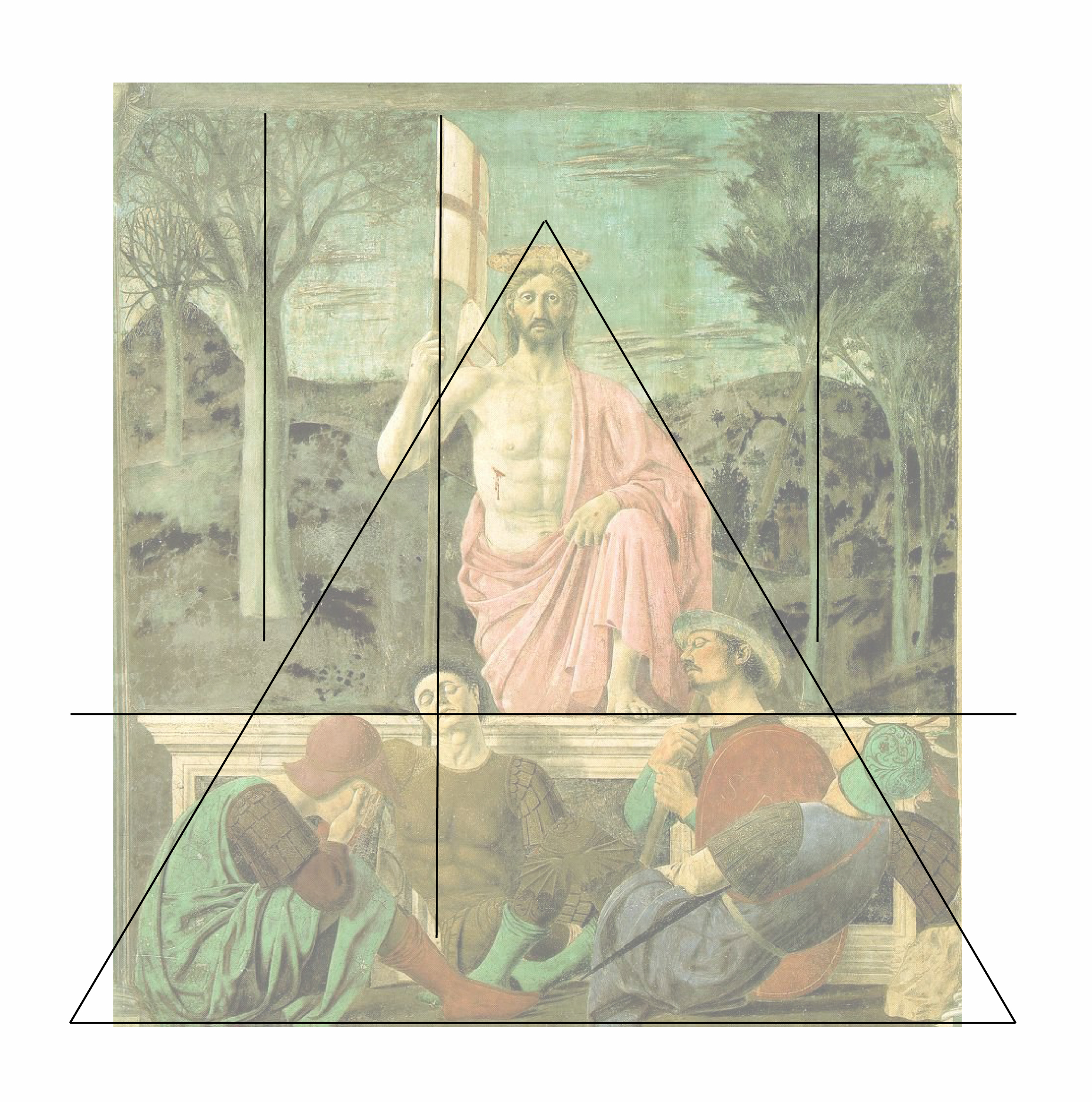 Schéma des ligne de forces du tableau de la Résurrection de Piero della Francesca